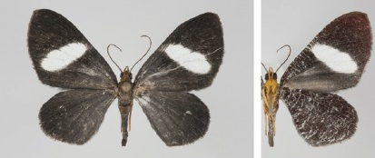 Hagnagora mortipax